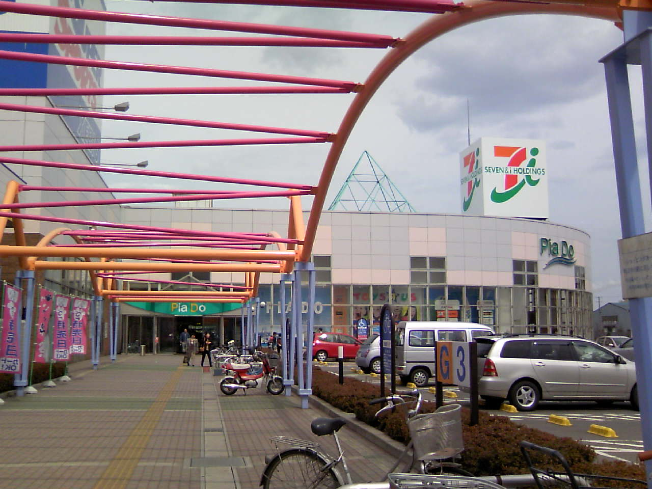 八戸・ピアドゥ (PiaDo - HACHINOHE, AOMORI, JAPAN)